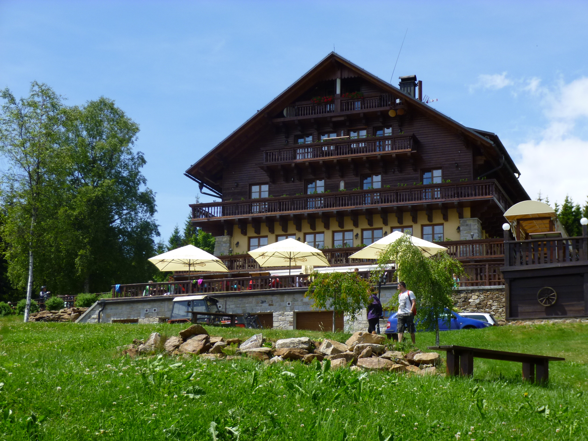 Das Hotel Peslova chata im Ort Bucina im Sumava-Nationalpark. Domizil für Wanderer und Wintersportler unweit der deutschen Grenze bei Finsterau. Übergang zum Nationalpark Bayerischer Wald.